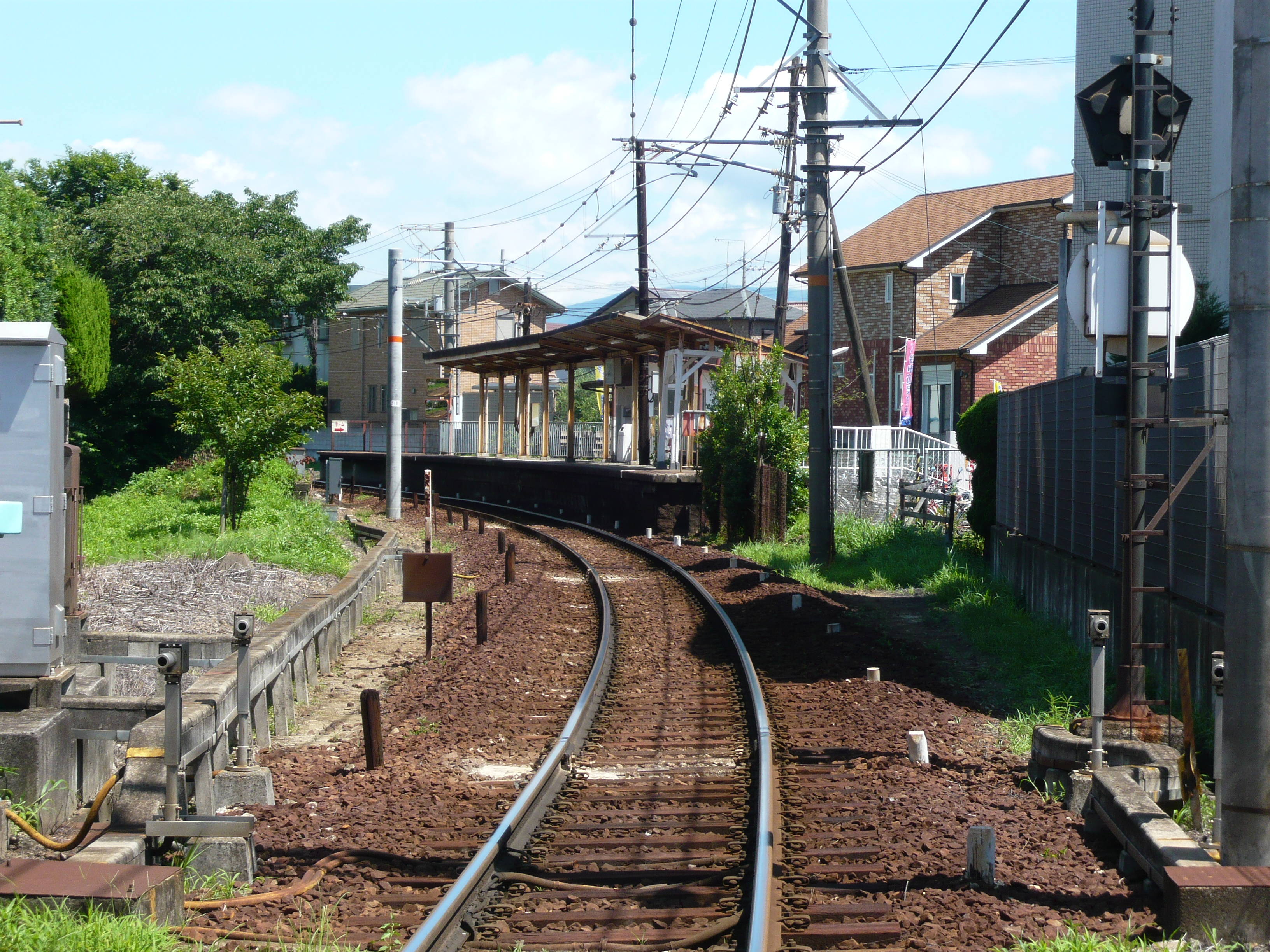 和歌山電鐵貴志川線 竈山駅 Kamayama station, Kishigawa line 2011.7.15